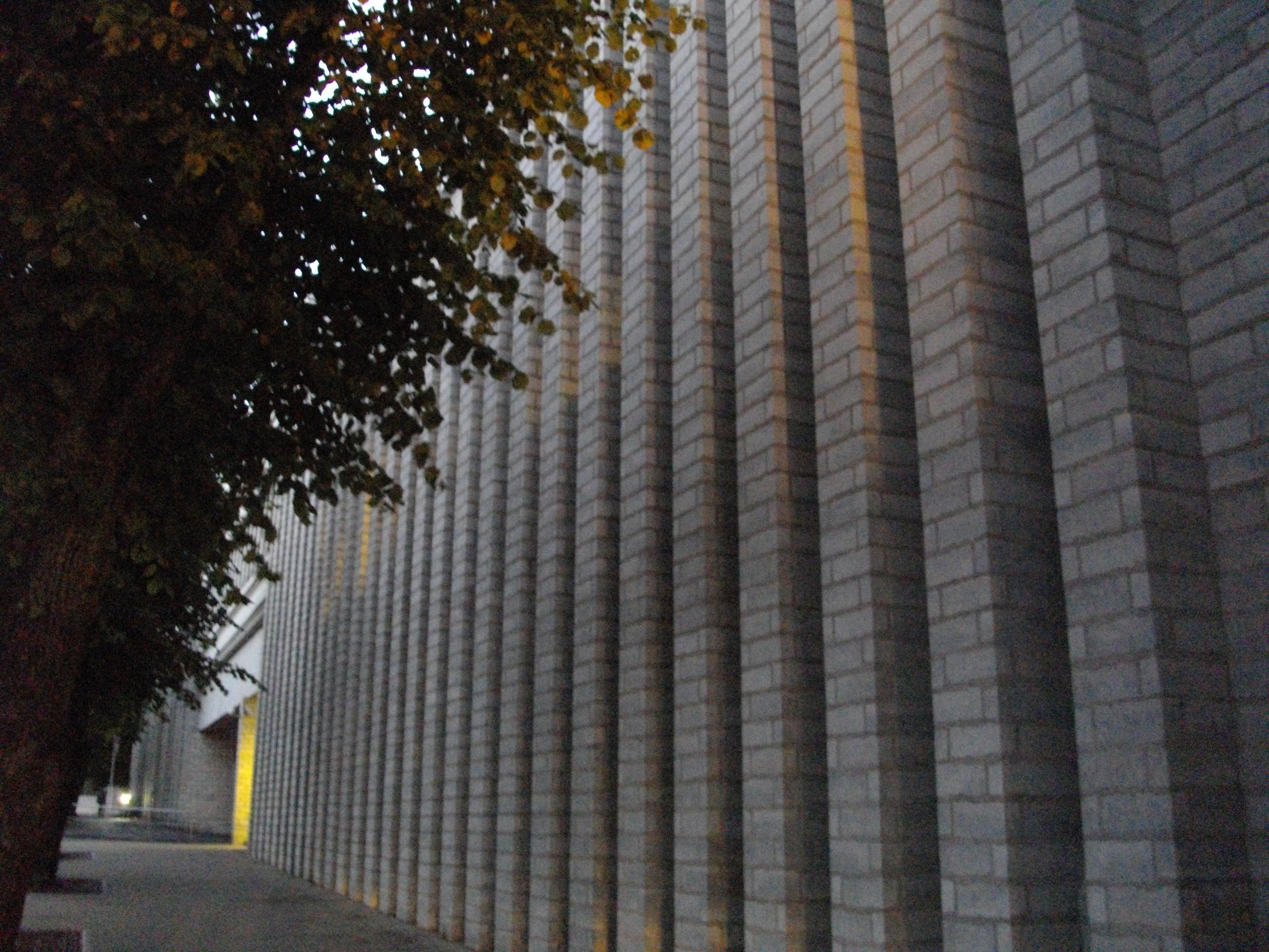 Sakala keskuse taastatud fassaad